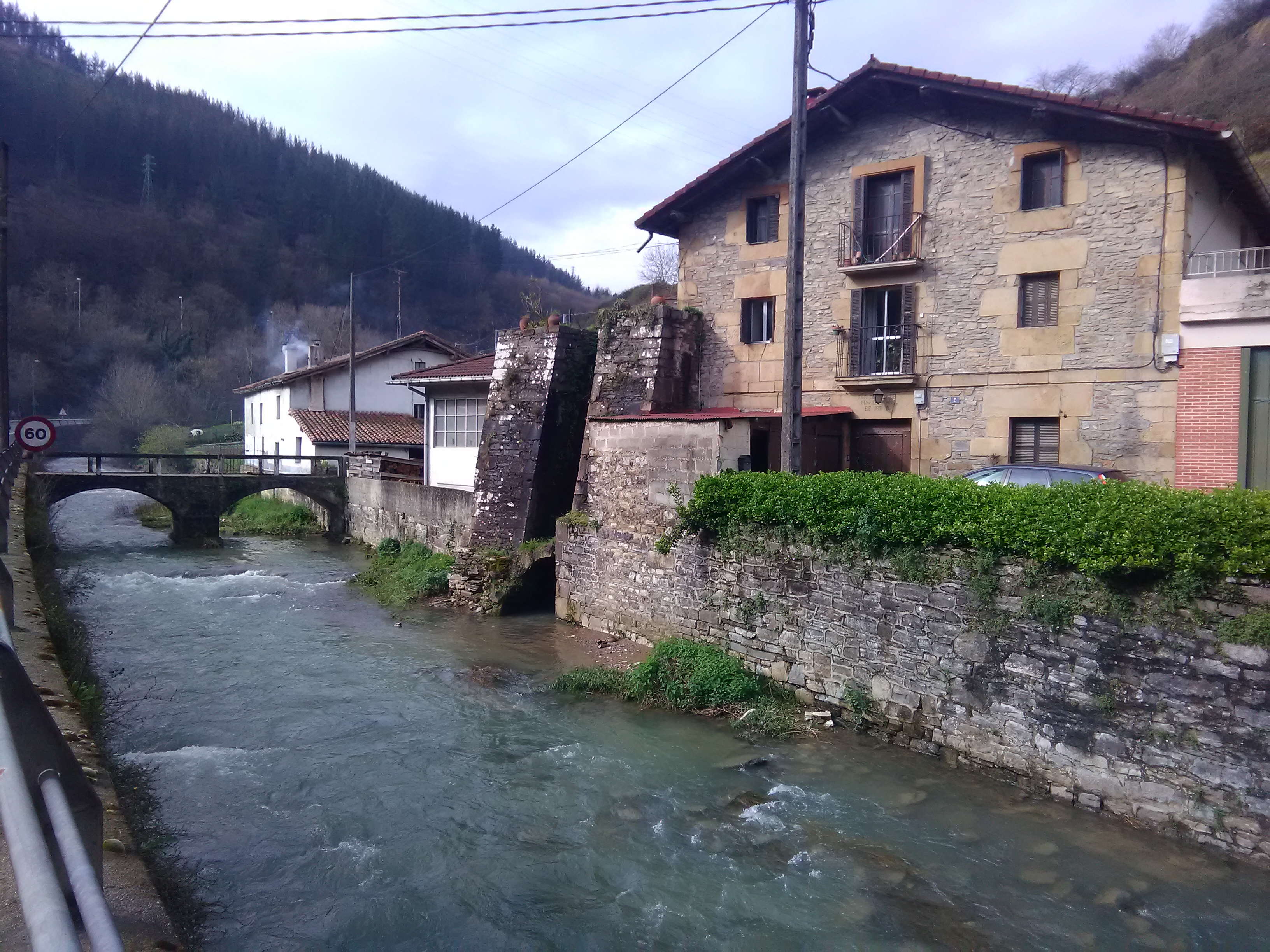 Olaerreaga etxea (edo Olaerregeaga), izen bereko Zaldibarko auzoan, Eibar eta Ermua artean, aurrean, Ego ibaia duela. Burdinola hau Ego ibarra egitura administratiboaren parte zen XIII. mendean, Eibar eta Ermuko hiribilduak sortu baino lehen.